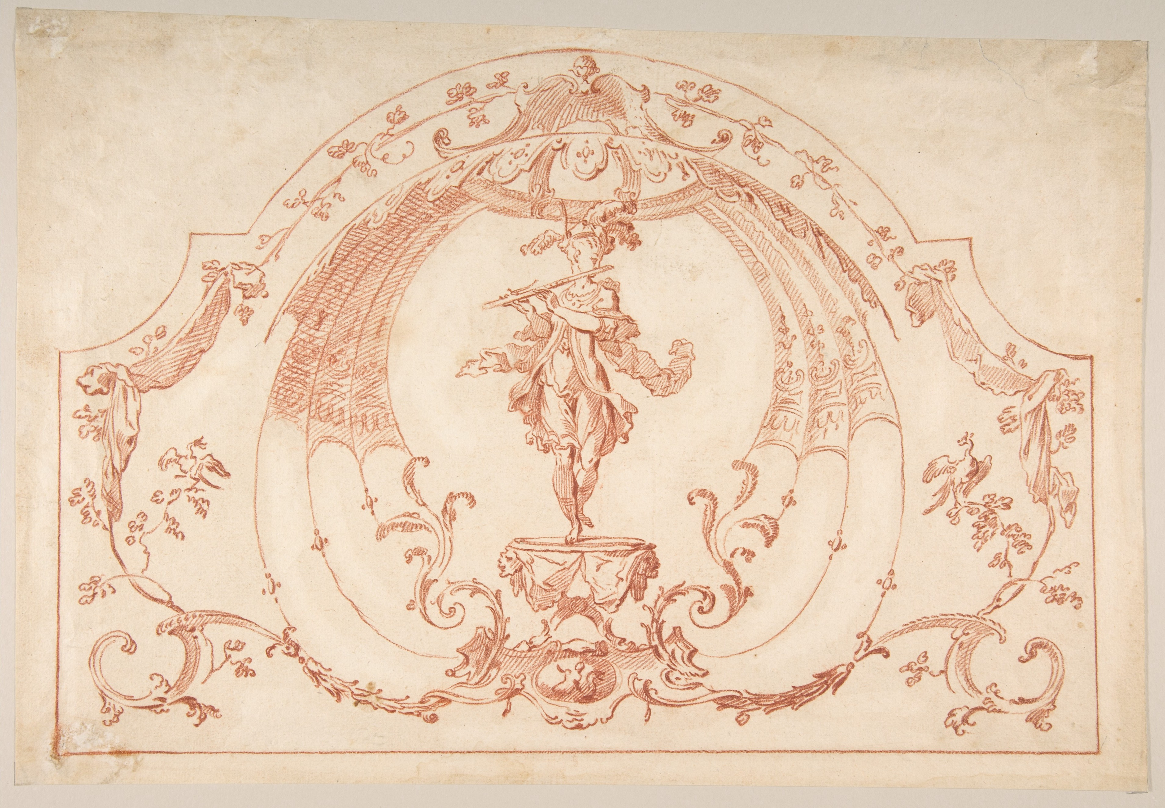 Drawing; Drawings